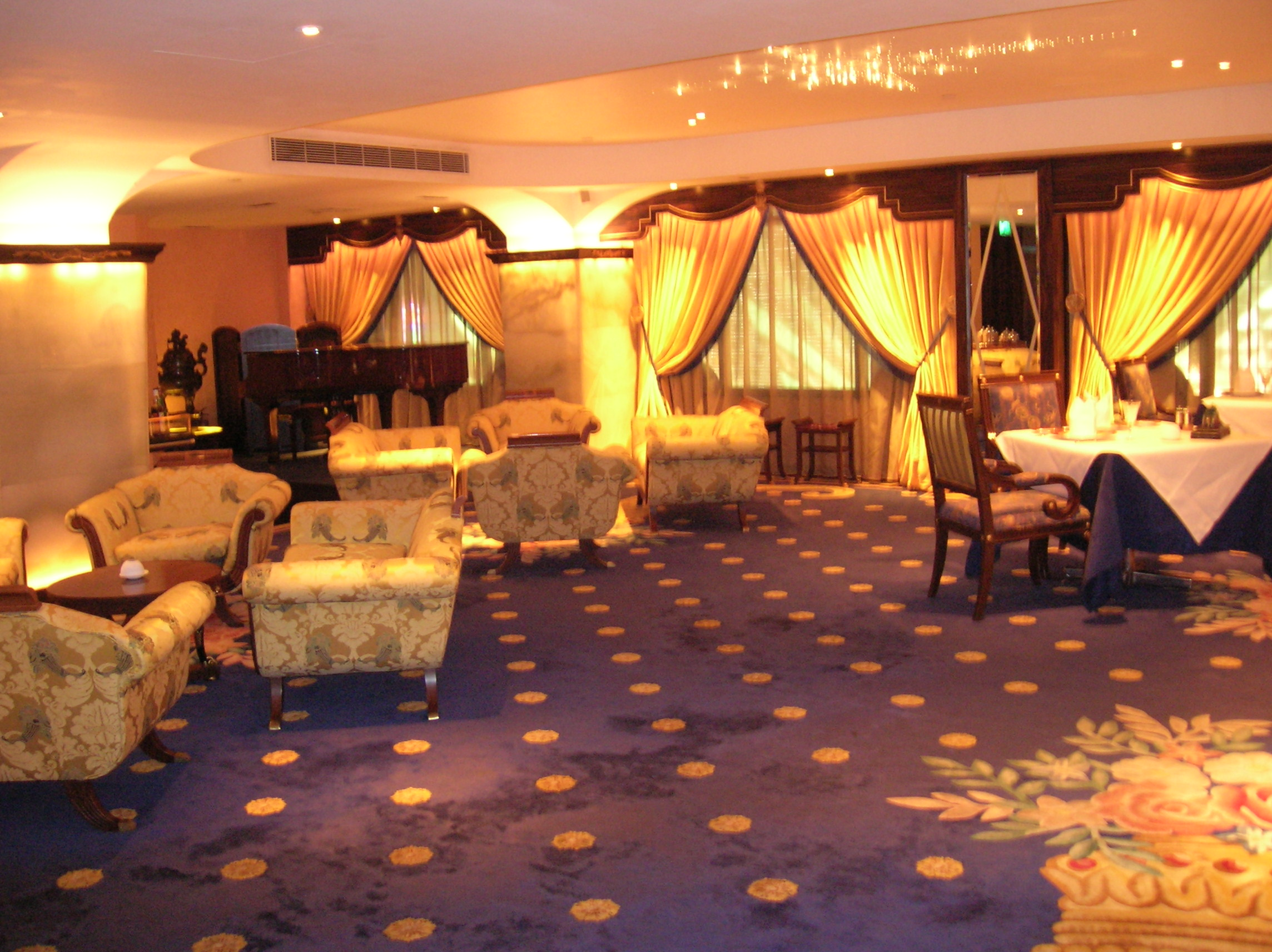 פנים מסעדת רובישון אה גאלרה במקאו